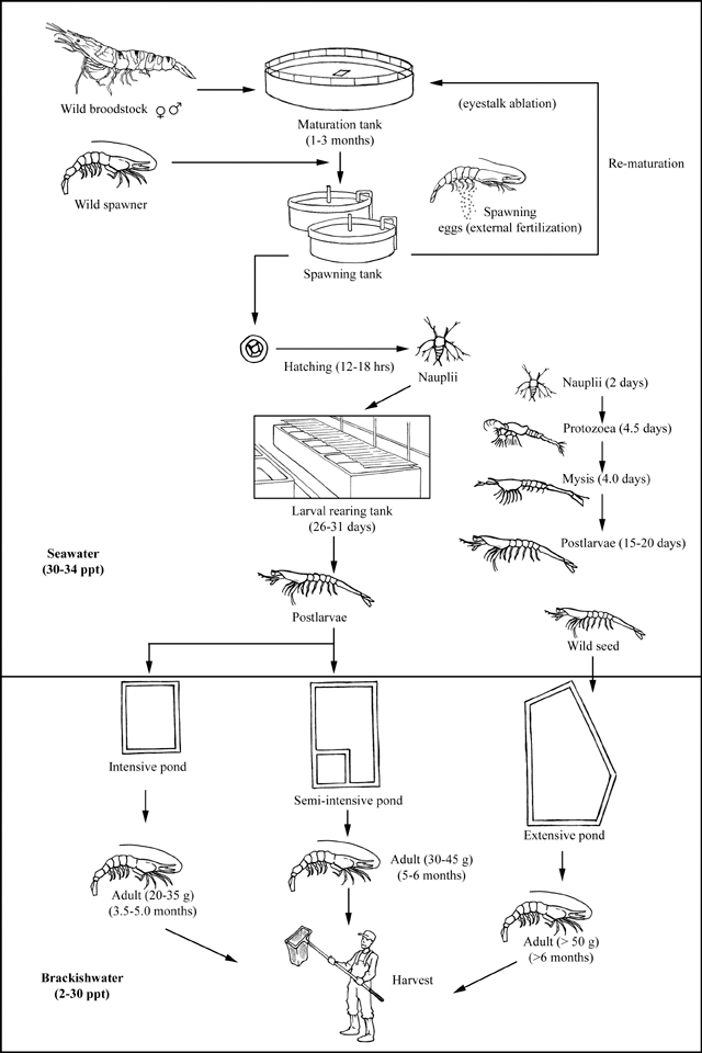 Eldi hjá Risa-tígrisrækju